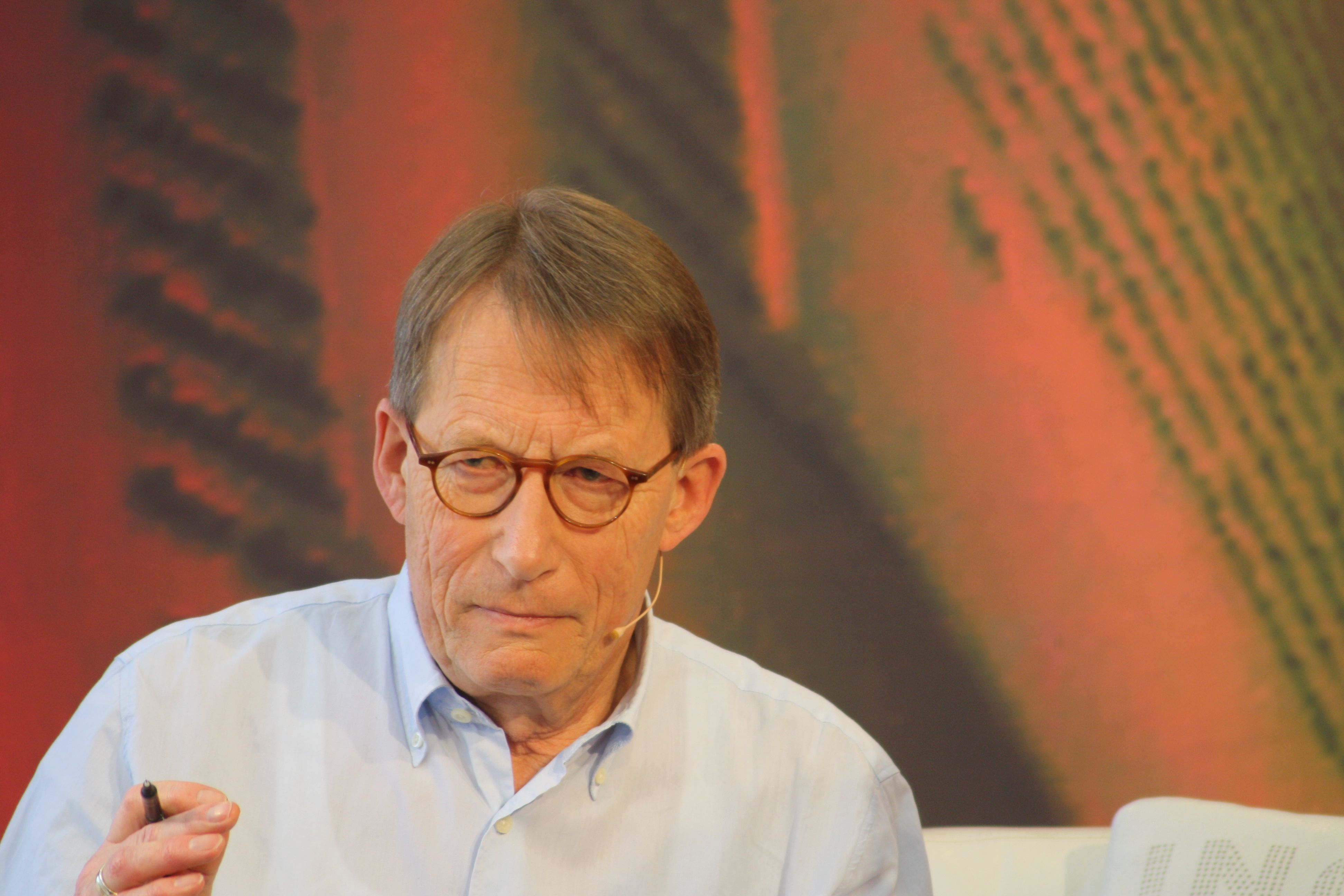 deutscher Autor